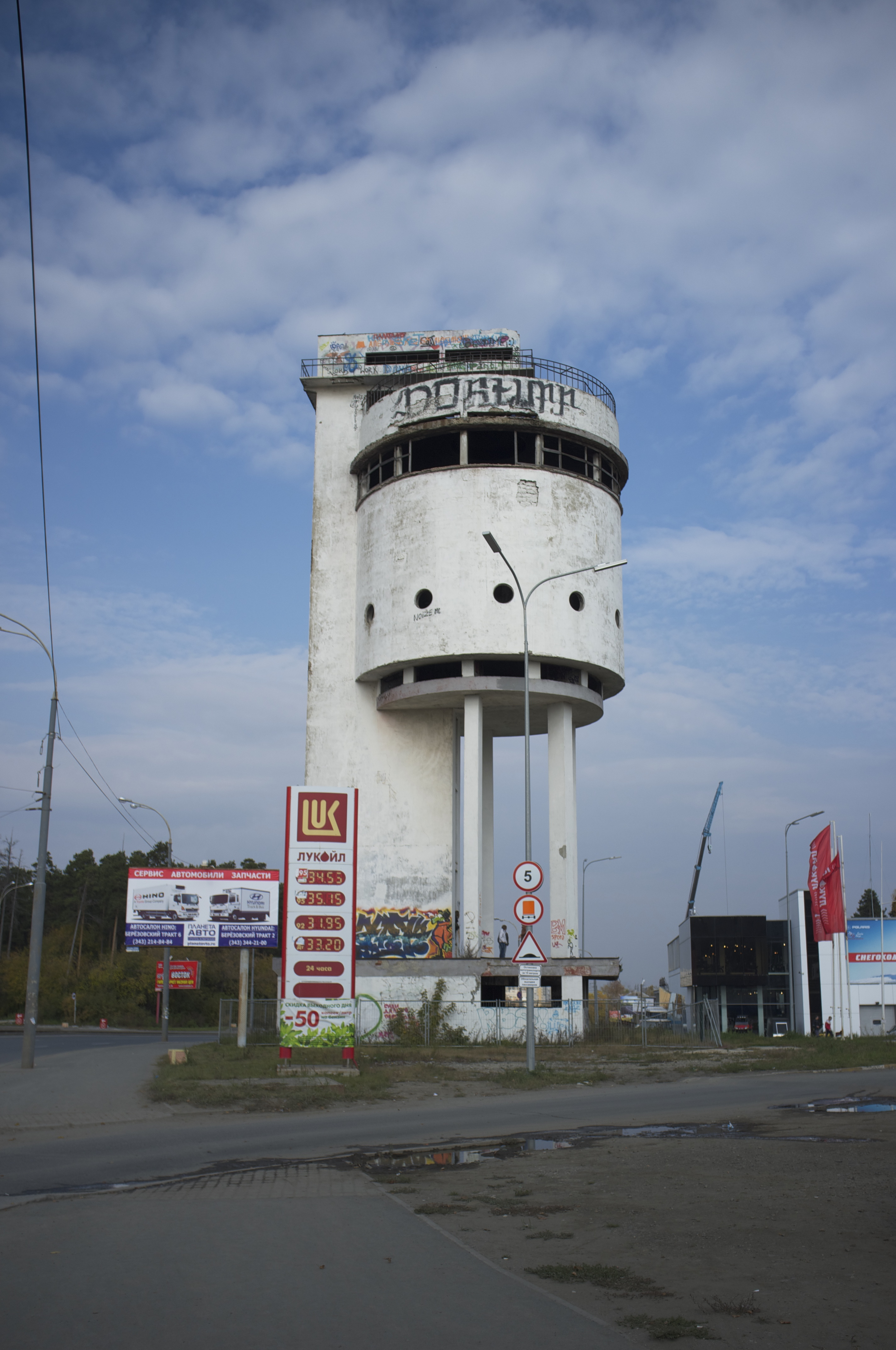 White Tower, Ekaterinburg